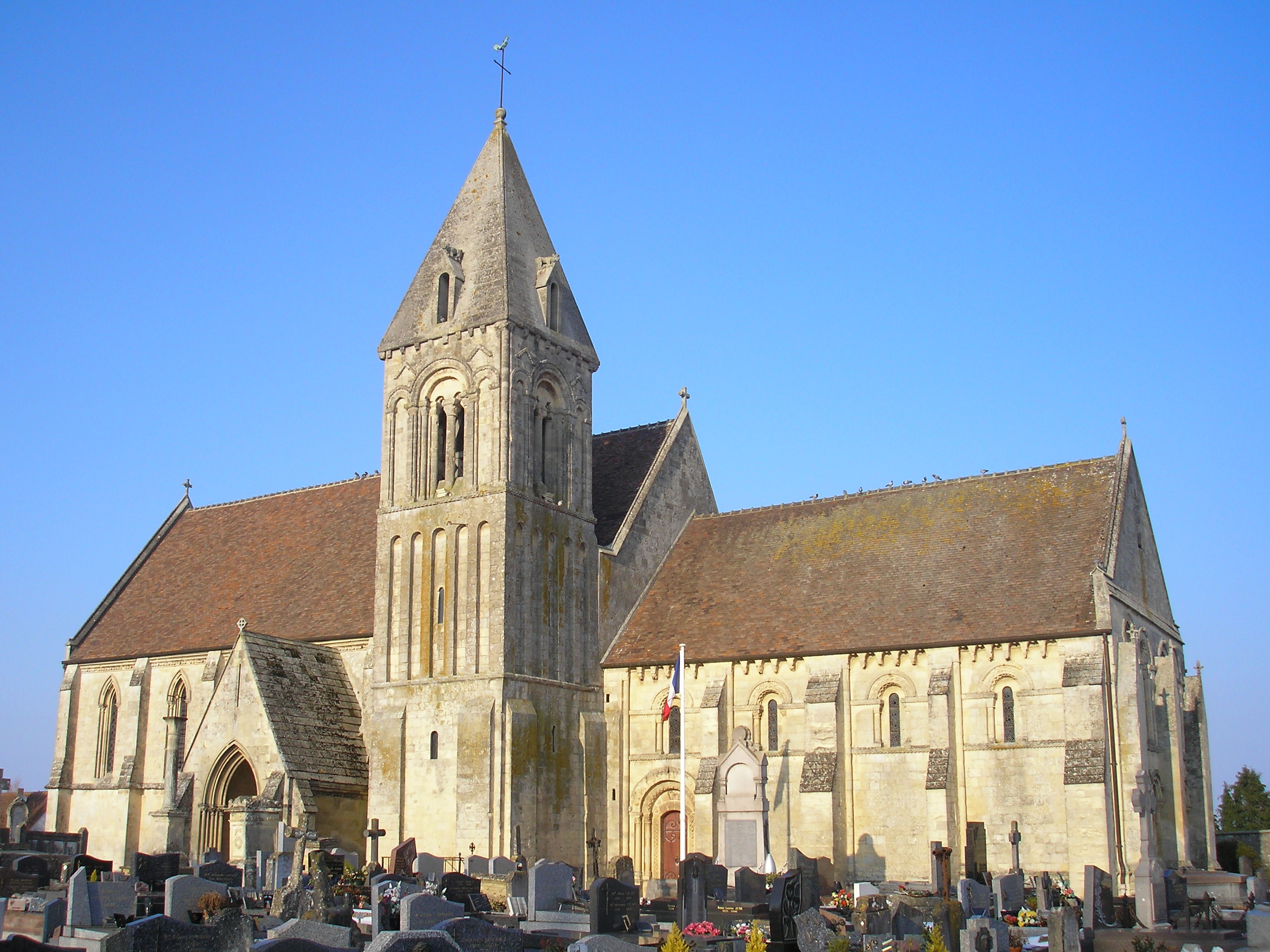 Saint-Contest (Normandie, France). L'église Saint-Contest.